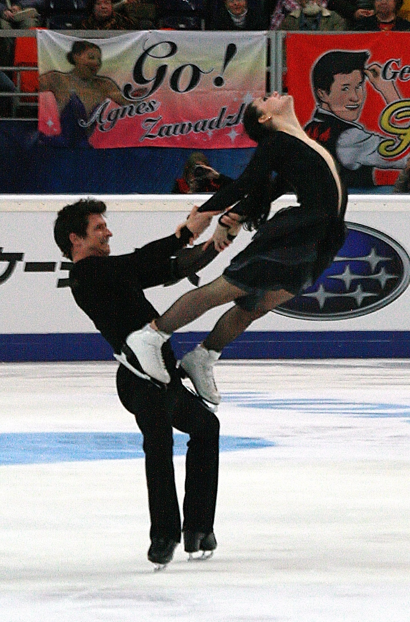 Тесса Виртью и Скотт Моир (Канада) на Кубке Ростелекома 2012.Произвольная программа.